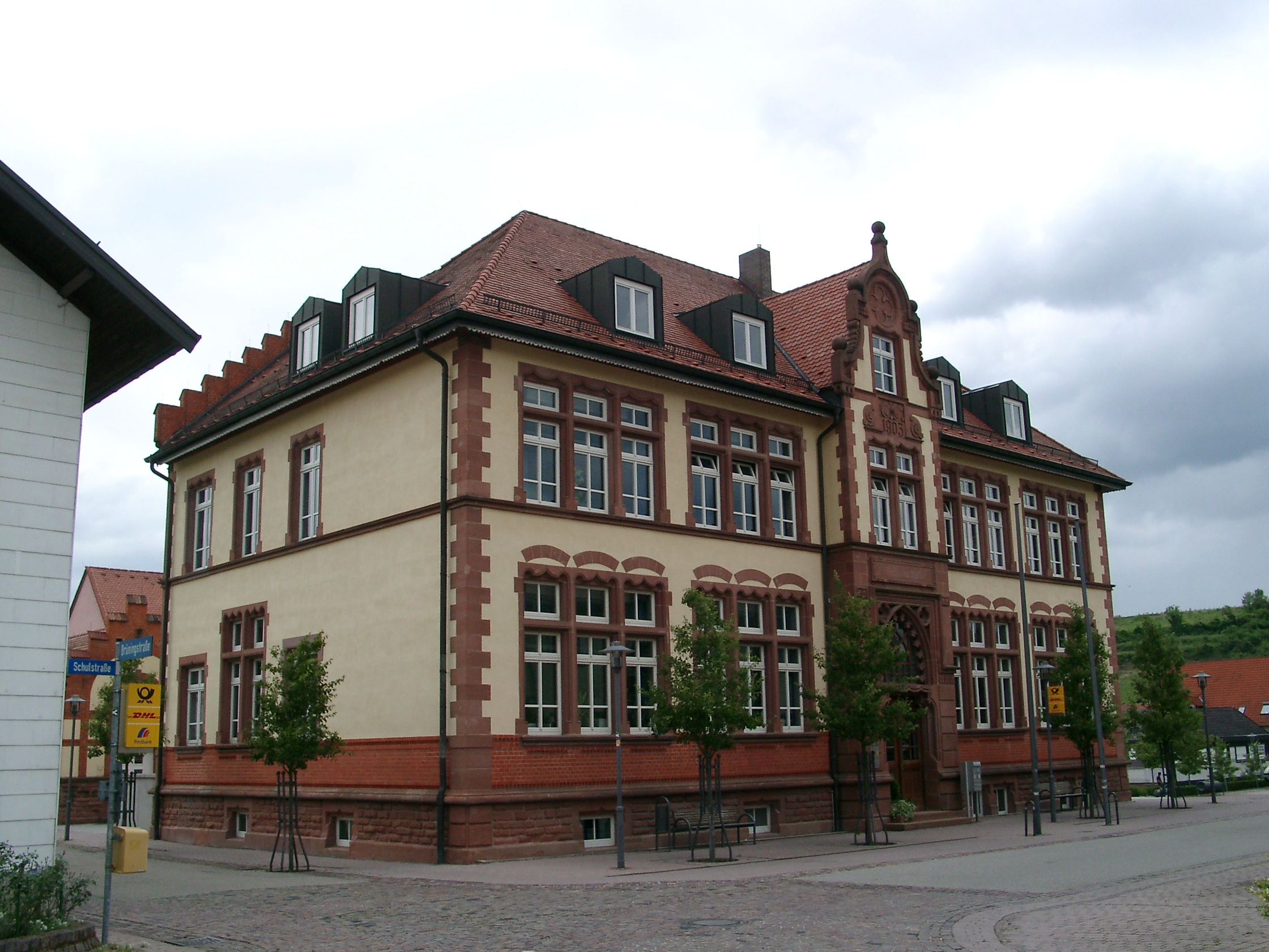 Mühlhausen (Kraichgau), Rathaus